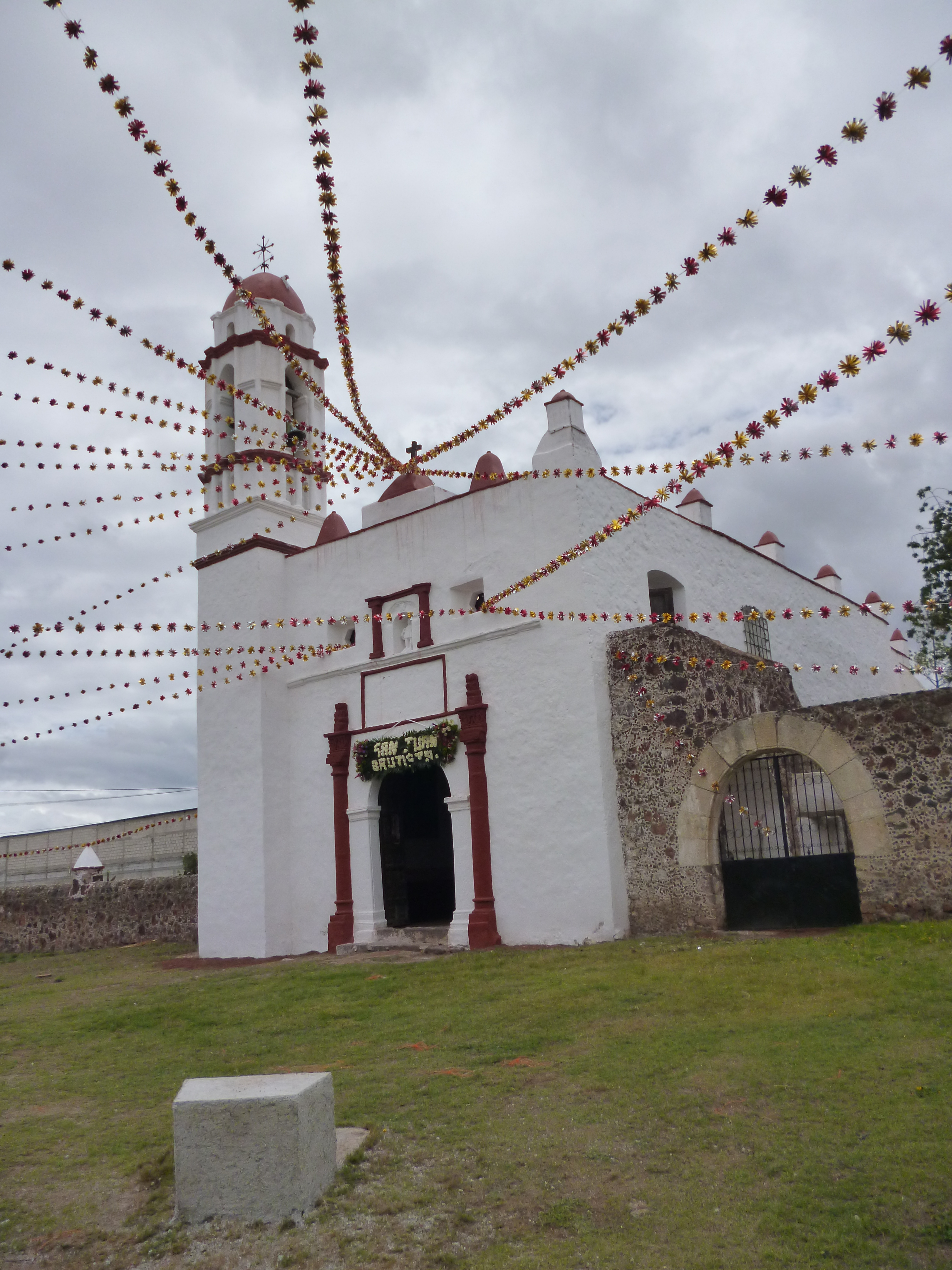 festejan la fiesta de San Juan